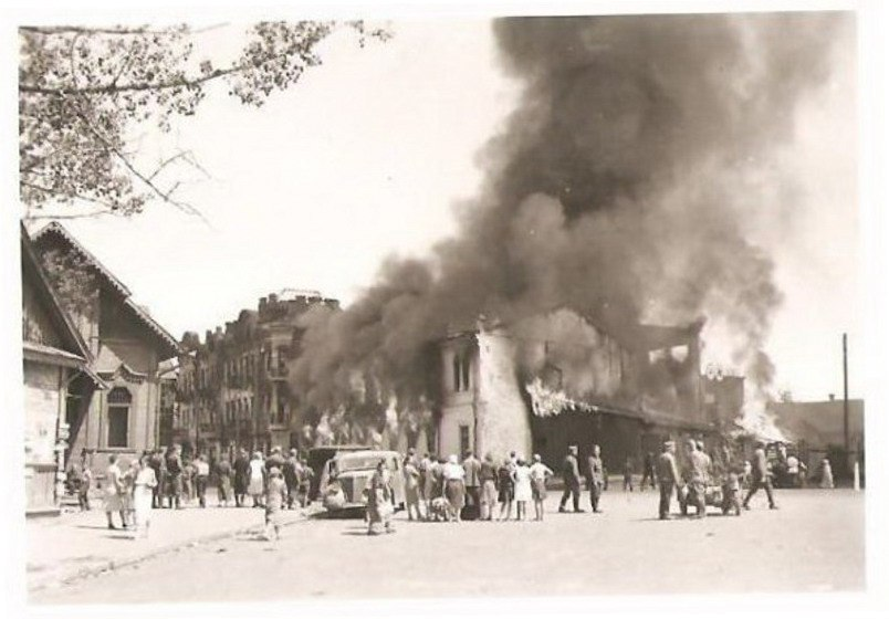 Беларуская (тарашкевіца): Менск (Miensk), вуліца Захараўская (vulica Zacharaŭskaja) з боку шляху Каралеўскага (šlach Karaleŭski)